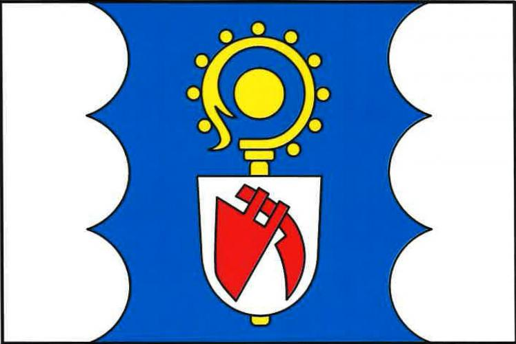 Vlajka obce Hněvotín